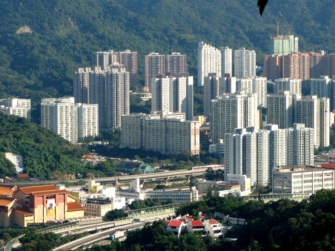 Sun Chui Estate 新翠邨